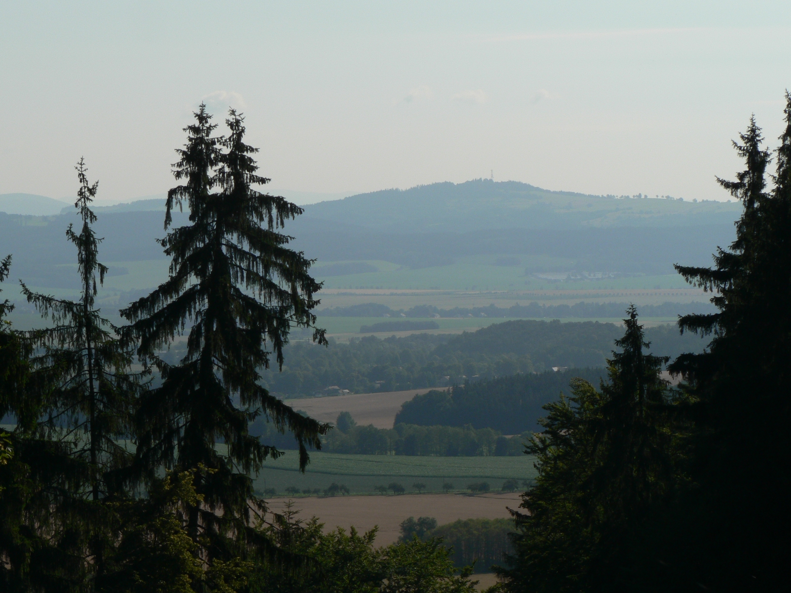 Pohled na Lázek, nejvyšší vrchol Zábřežské vrchoviny od západu.